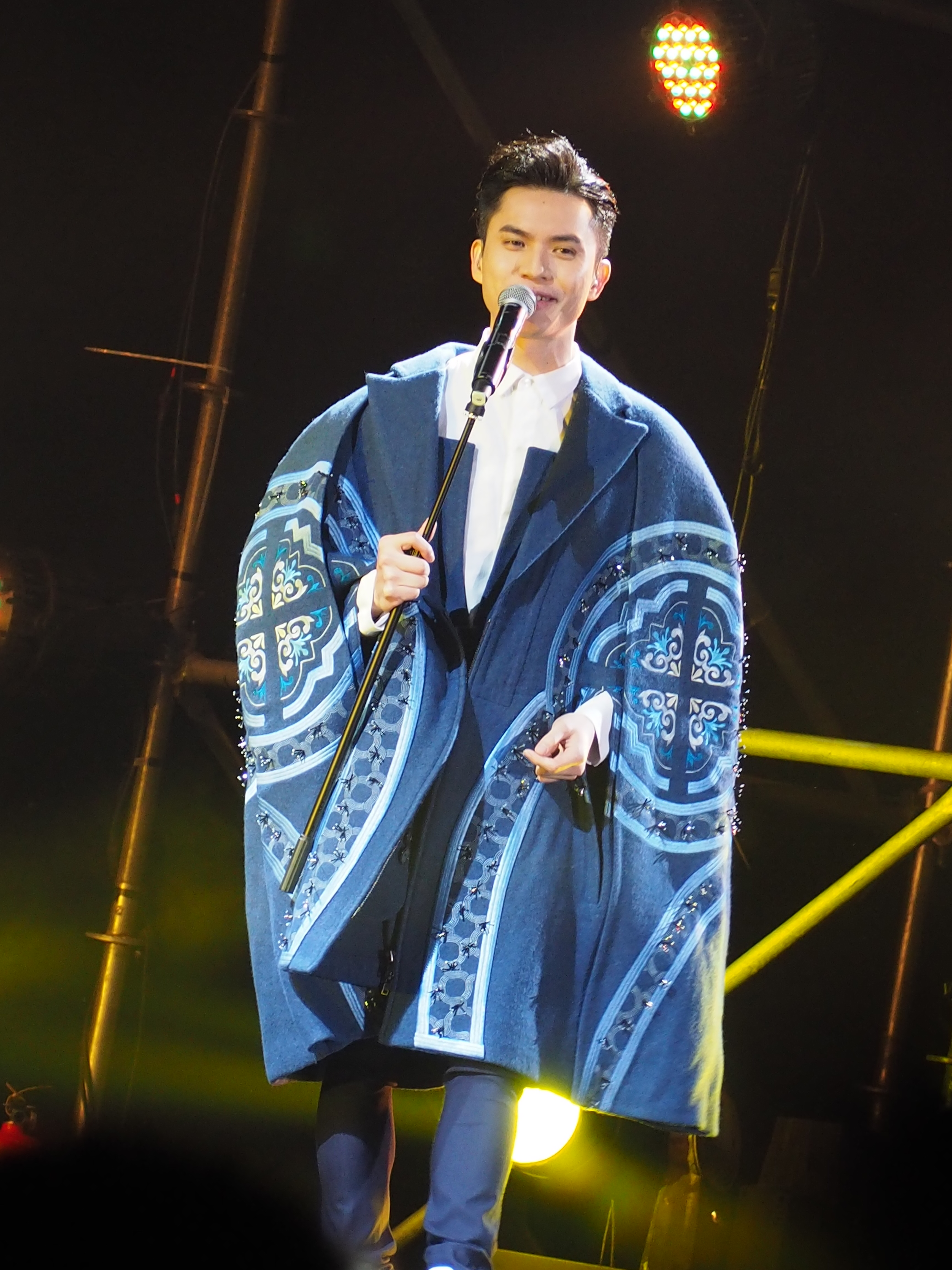 King @ C AllStar 2016 C AllStar 廣州天梯演唱會